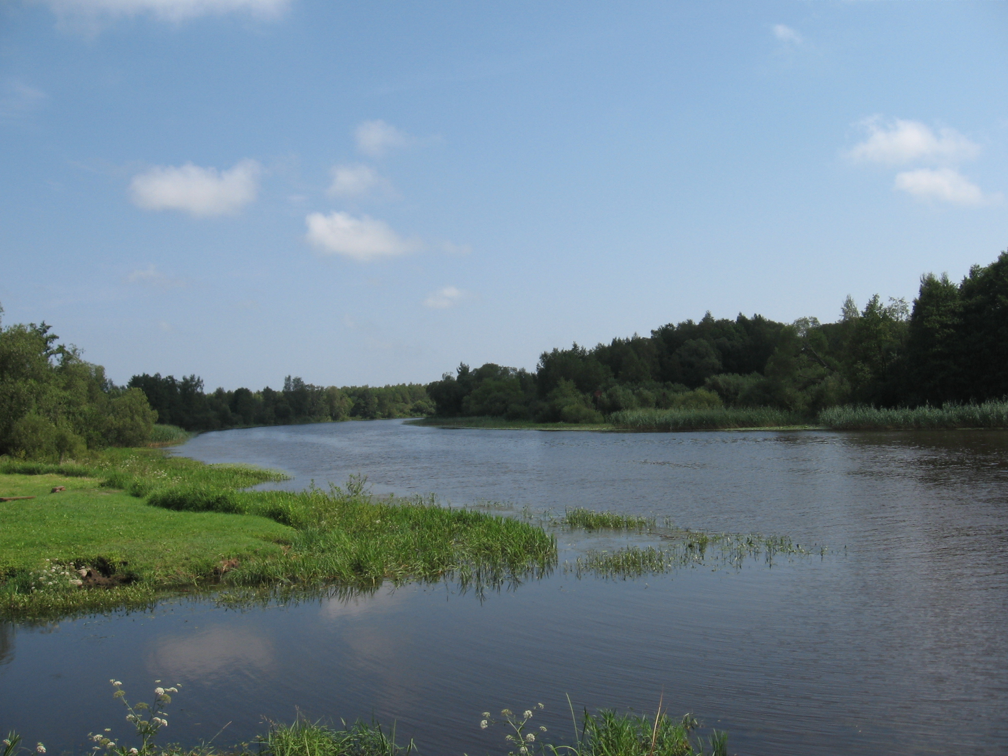 Suur-Emajõgi Emajõe-Suursoo kaitsealas